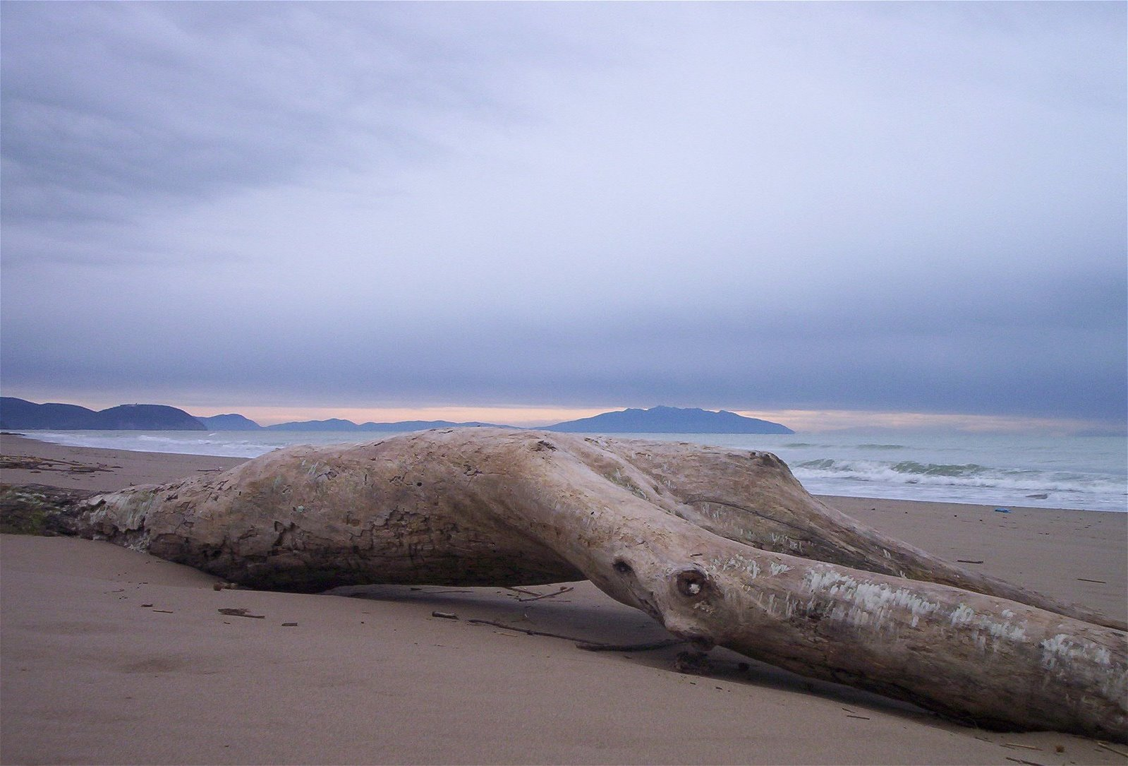 Fotografia del Parco